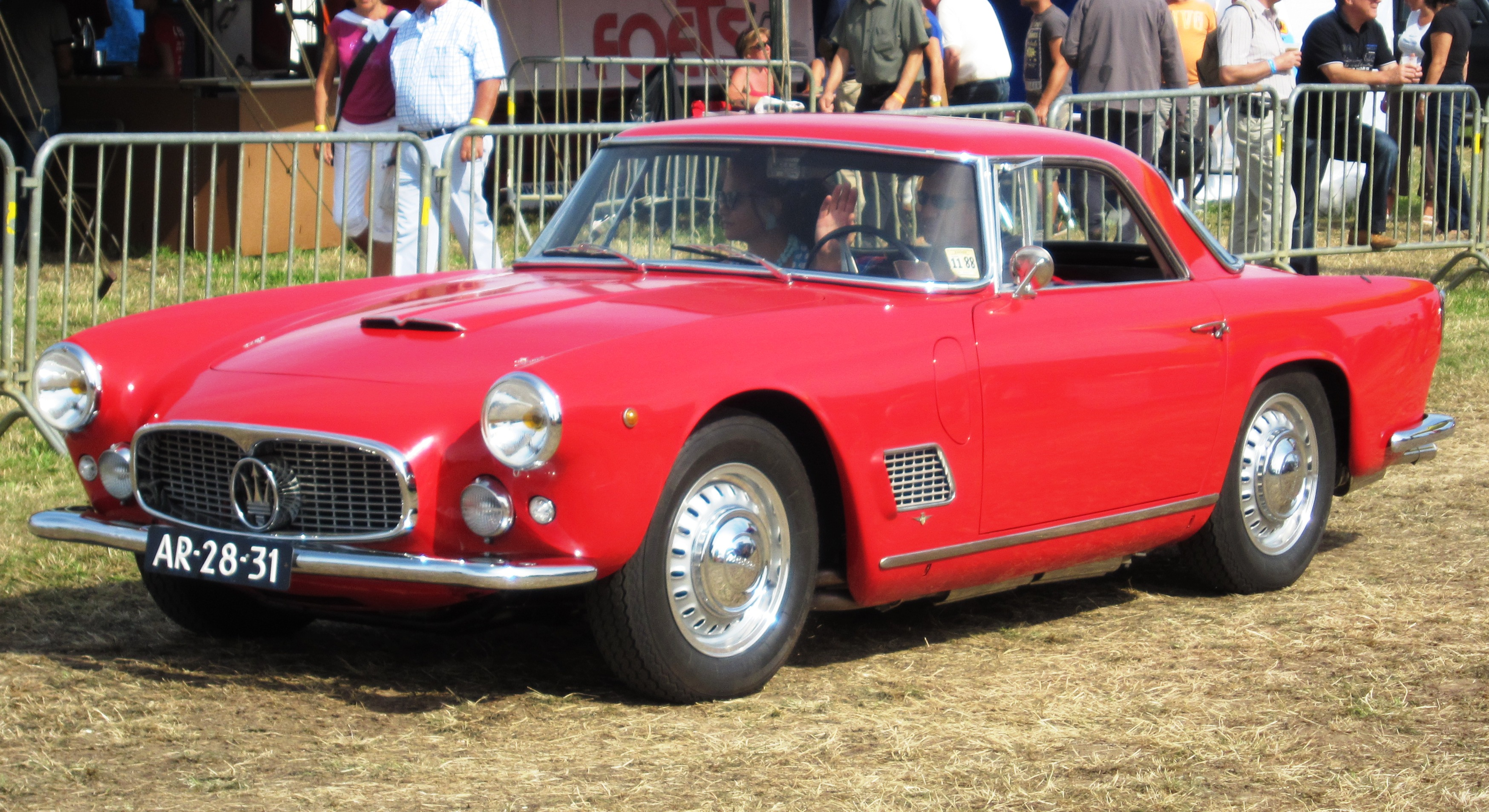 Maserati 3500 GT rouge